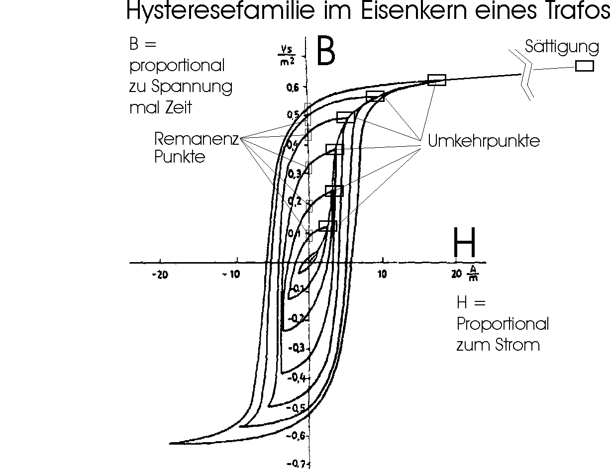 Hysteresekurvenfamilie bei verschiedenen Spannungen aufgenommen